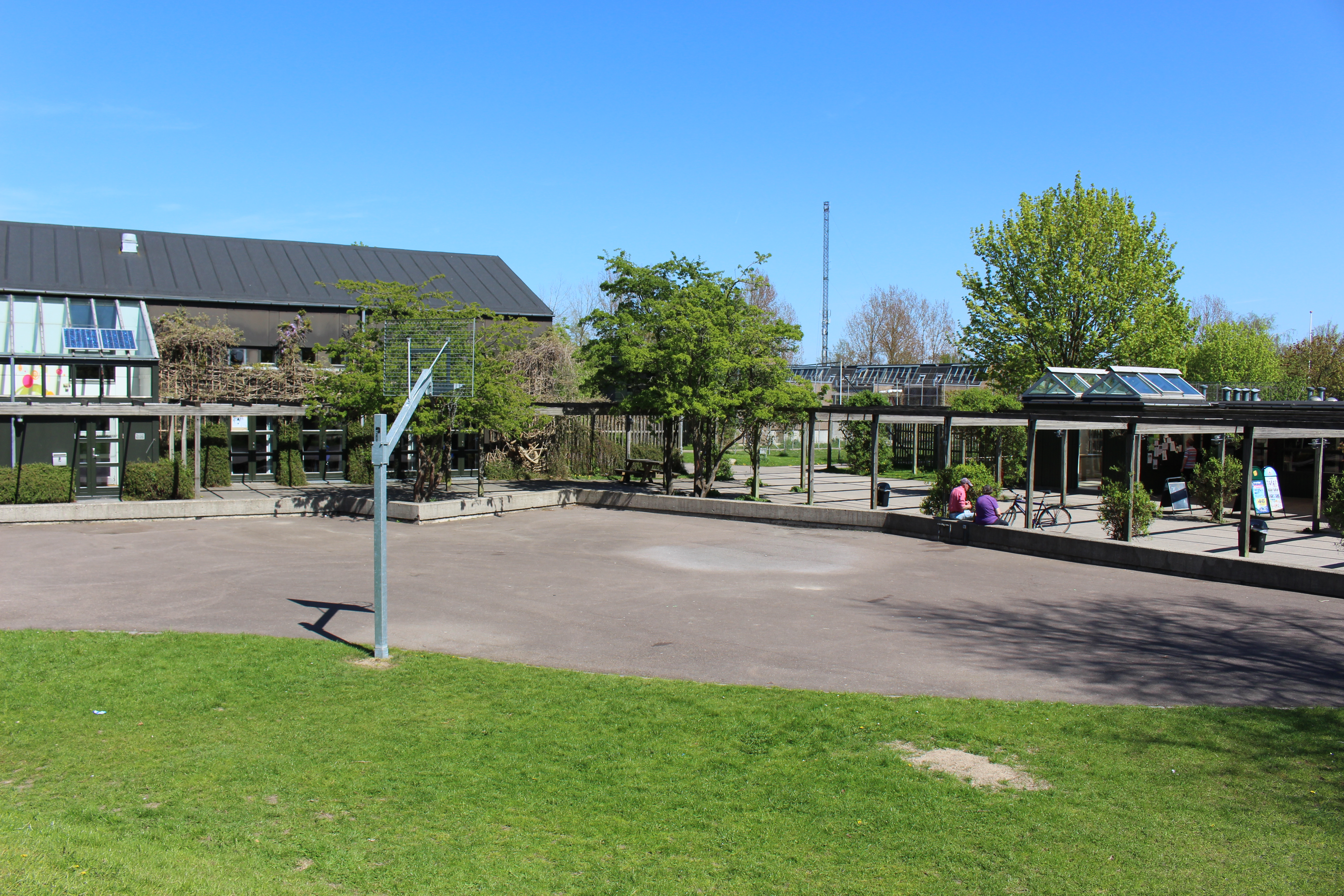 Central plads i Galgebakken